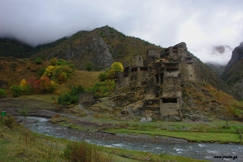 Shatili, Khevsureti, NE Georgia